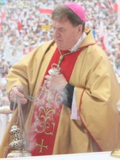 Zdjęcie zrobione na JG podczas pielgrzymki RM Kleryk - powiększenie i poprawka poprzedniego